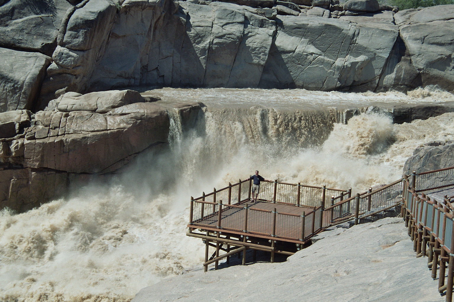 Augrabie Falls